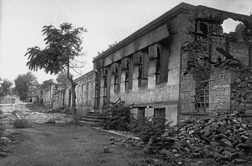 İmamlı küçəsinin dağıntıları. Kərbəlayi Məmməd Əli Əliyevin evi